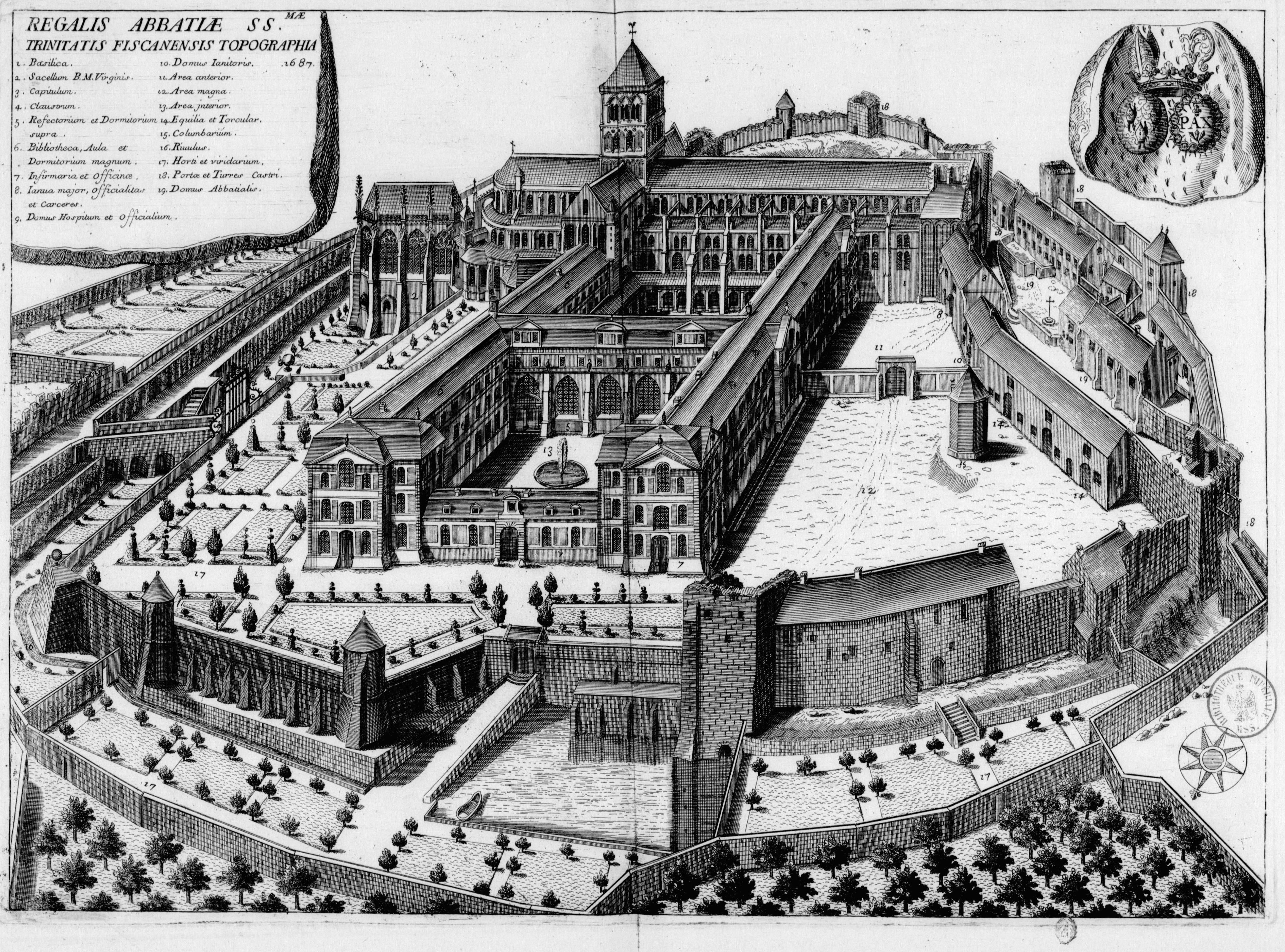 Planche gravée du 17ème siècle représentant l'abbaye de la Trinité de Fécamp, dans le livre Monasticon Gallicanum.